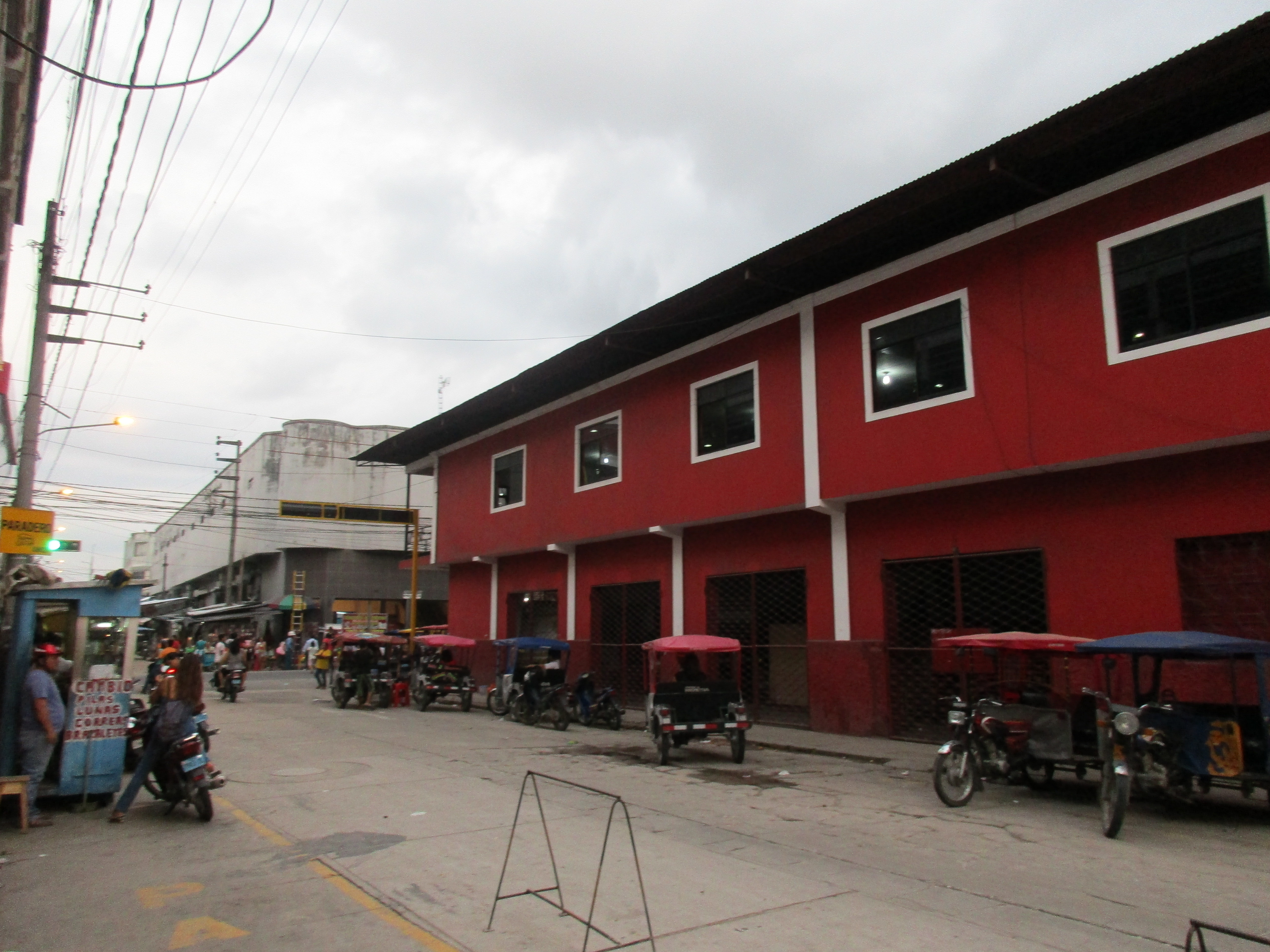 Casa de los Bomberos en el jirón Prospero